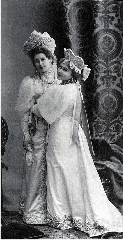 Фрейлина императрицы Александры Федоровны Анна Александровна Танеева (слева) с сестрой Александрой Александровной Танеевой (в костюмах для исполнения на бале "русской"). Двойной портрет.